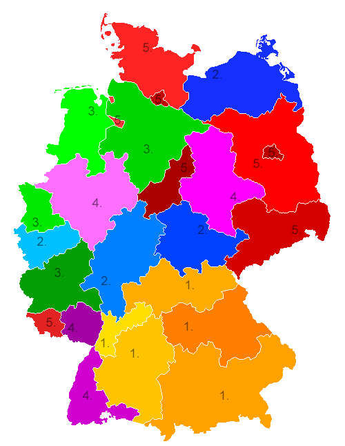 Die Karte zeigt die 24 Oberlandesgerichtsbezirke der Bundesrepublik Deutschland. Die Zahlen sind geografisch am Sitz des jeweiligen Oberlandesgerichts (OLG) gesetzt und geben wieder, welchem Strafsenat des Bundesgerichtshofes (BGH) es zugeordnet ist. Stand: 2015